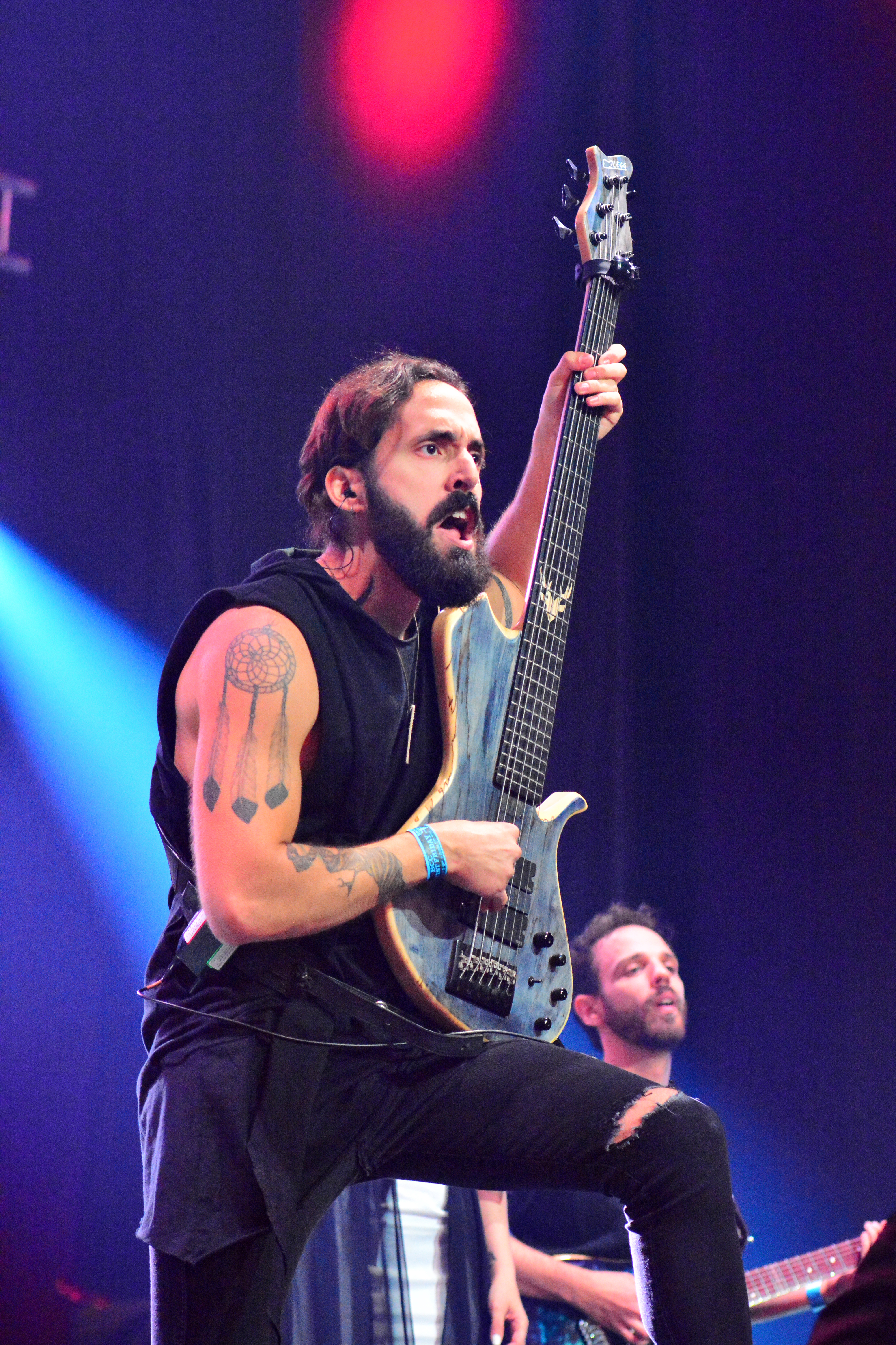 Ancient Bards beim Wacken Open Air 2015